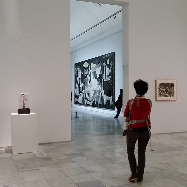 Guernica! #vacaciones #naosabendoqueeraproibido #fuilaefotografei